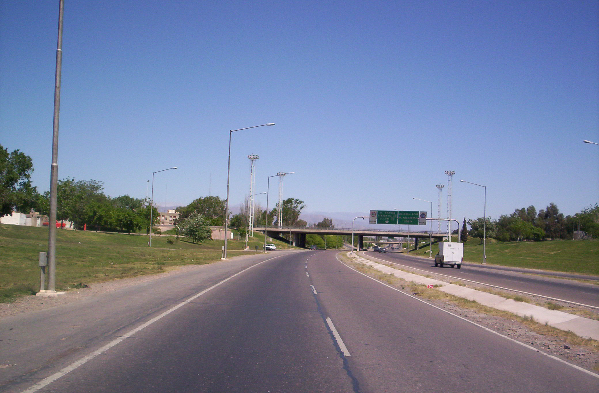 Vista de la autopista de circunvalación de la ciudad de San Juan, Argentina